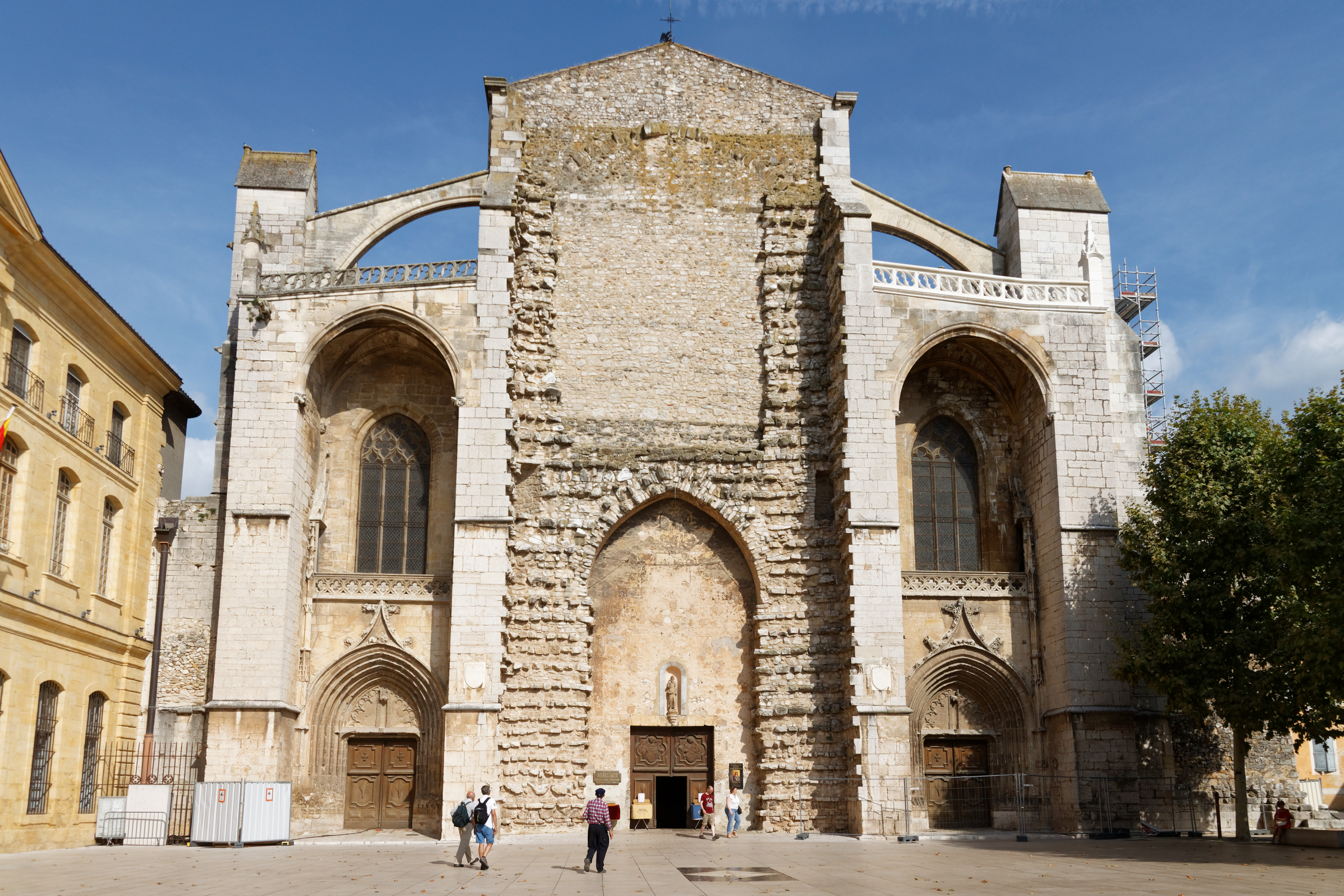 Hauptfassade der Basilique Sainte-Marie-Madeleine in Saint-Maximin-la-Sainte-Baume